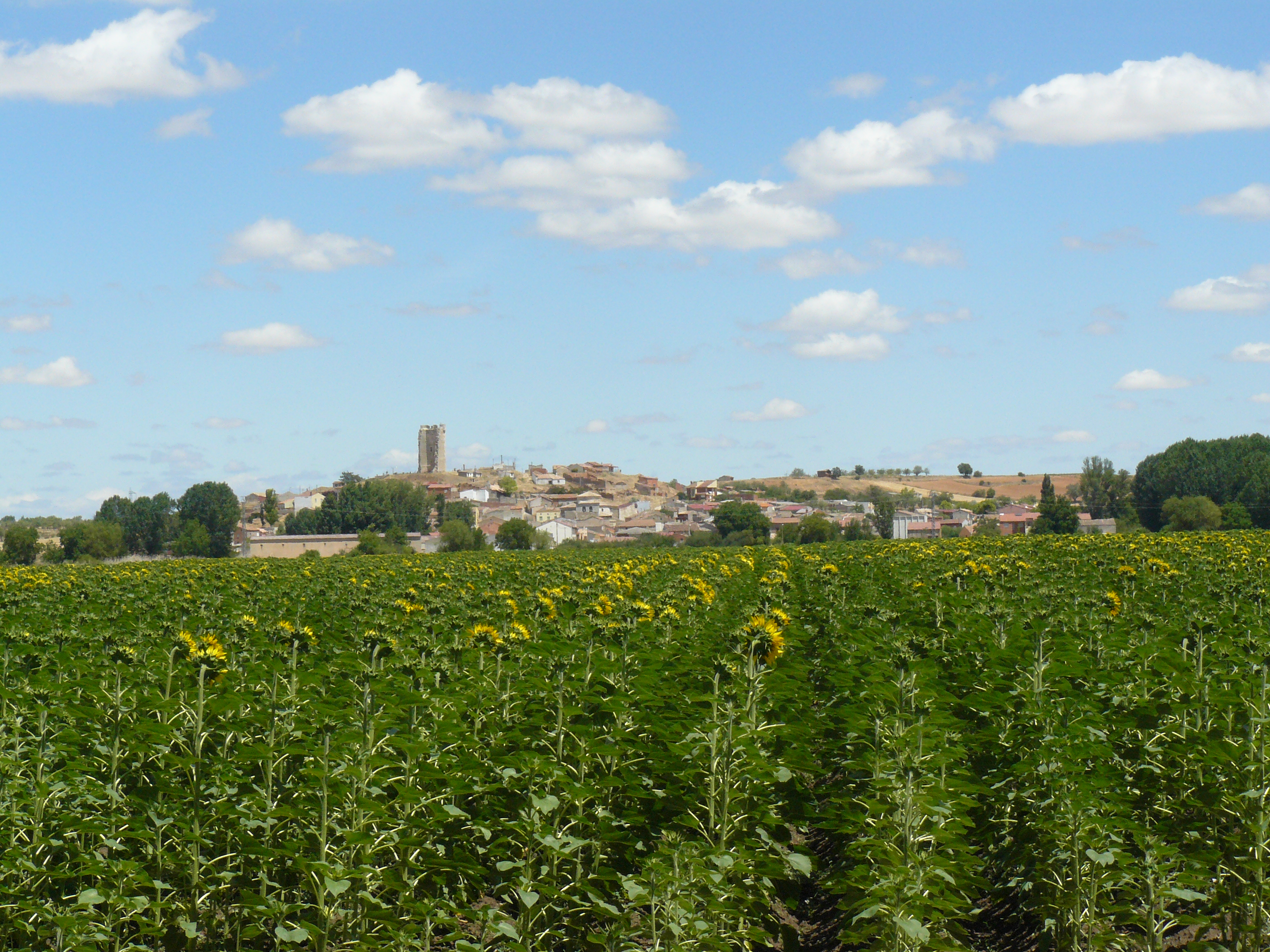 Hoyales de Roa (Burgos).